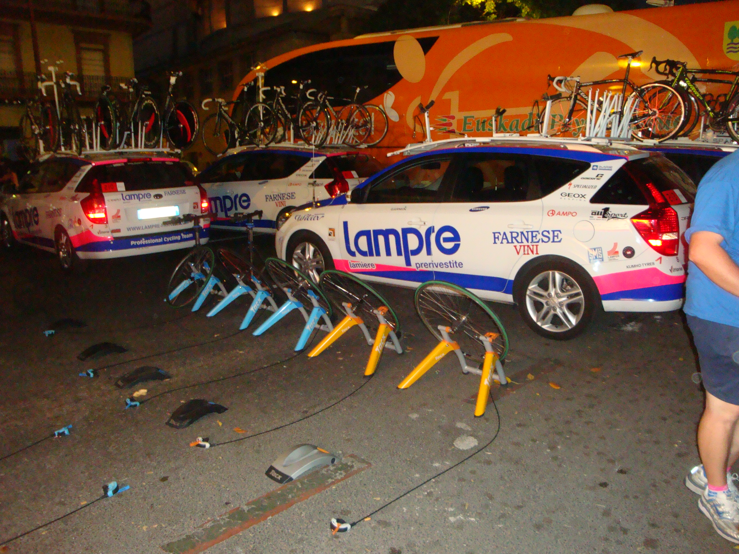 Vehículo de Servicio del equipo ciclista Lamprea en al Vuelta a España 2010